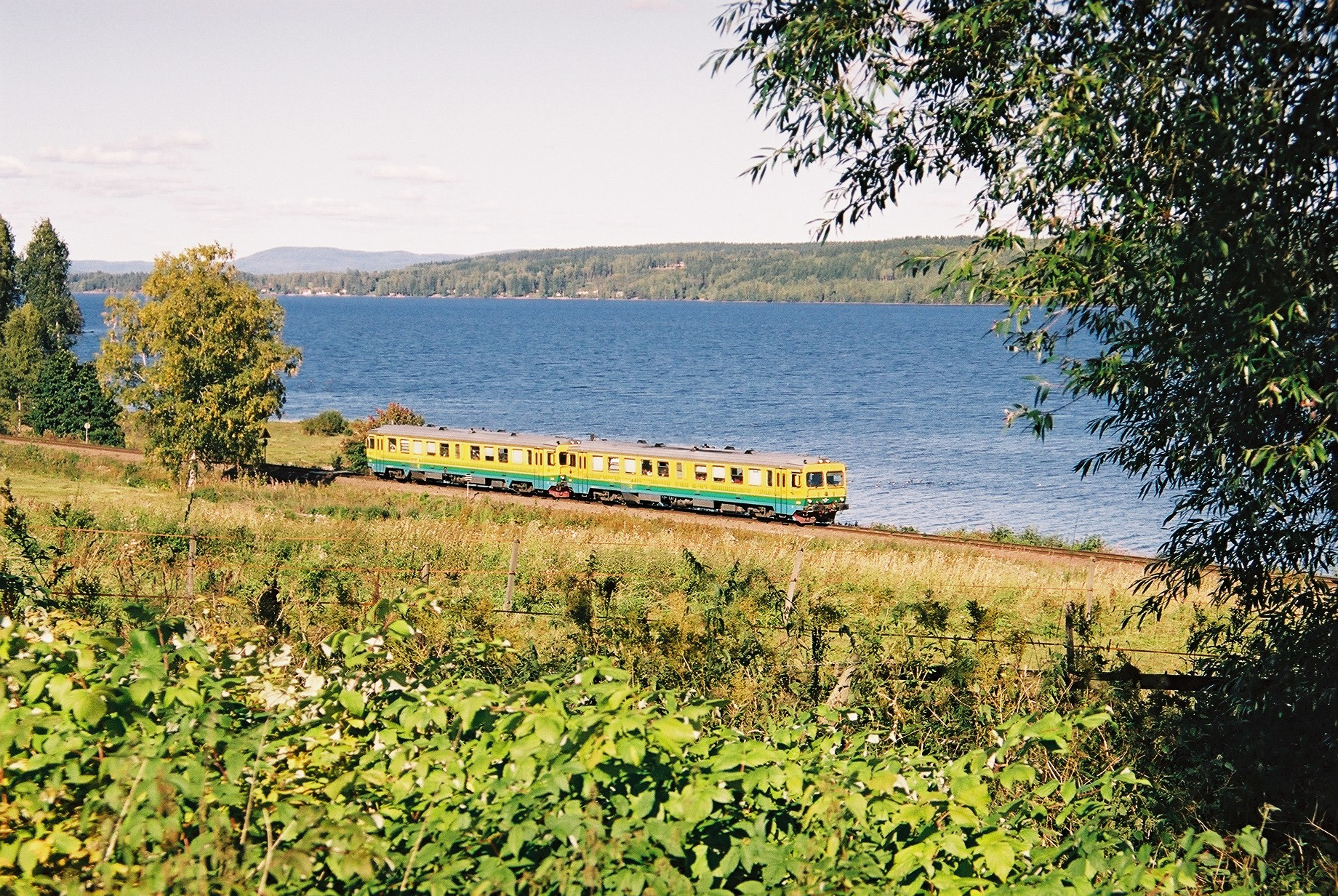 Länståg Torsby - Karlstad nördlich von Västra Ämtervik. Train between Torsby - Karlstad, Sweden.